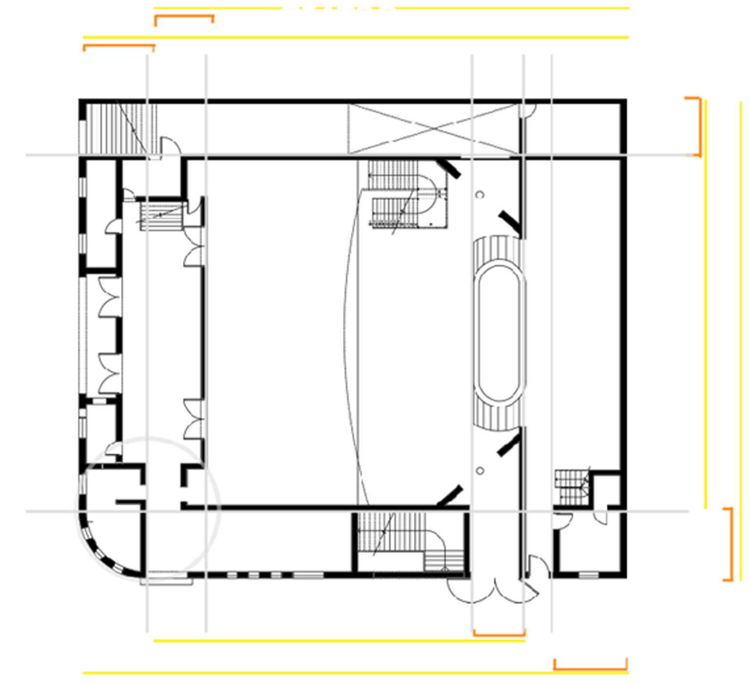 analisis estructural teatro San Bernardo, San Bernardo, Santiago, Chile